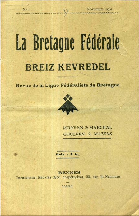 N°1 de La Bretagne Fédérale , daté de novembre 1931